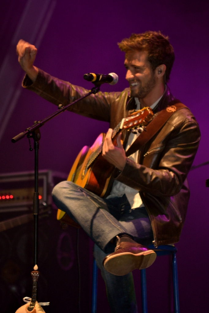 Concerto de Pablo Alboran em Cantanhede, Portugal